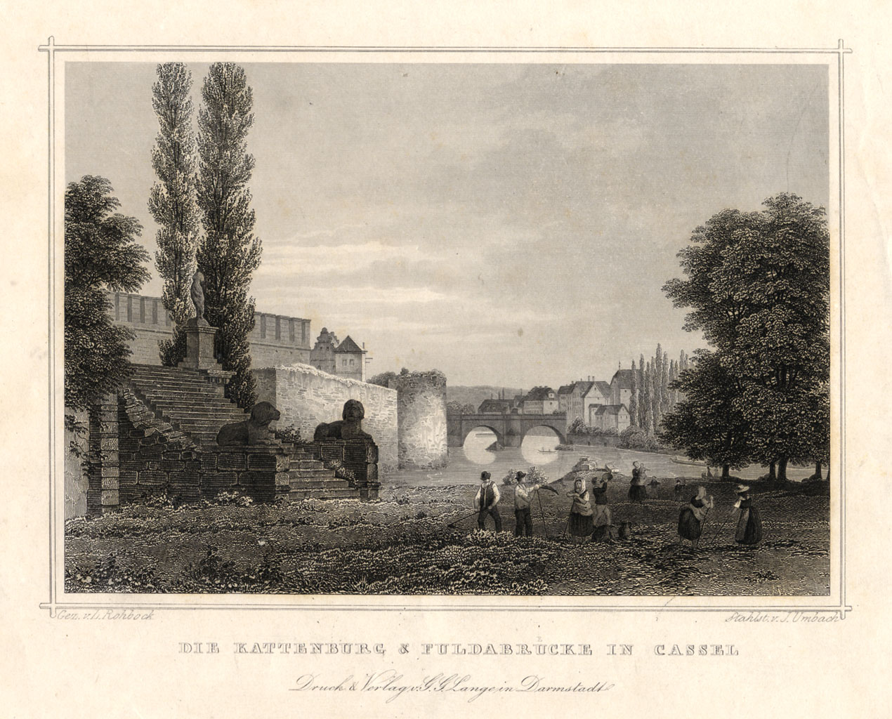 Gez. v. L. Rohbock